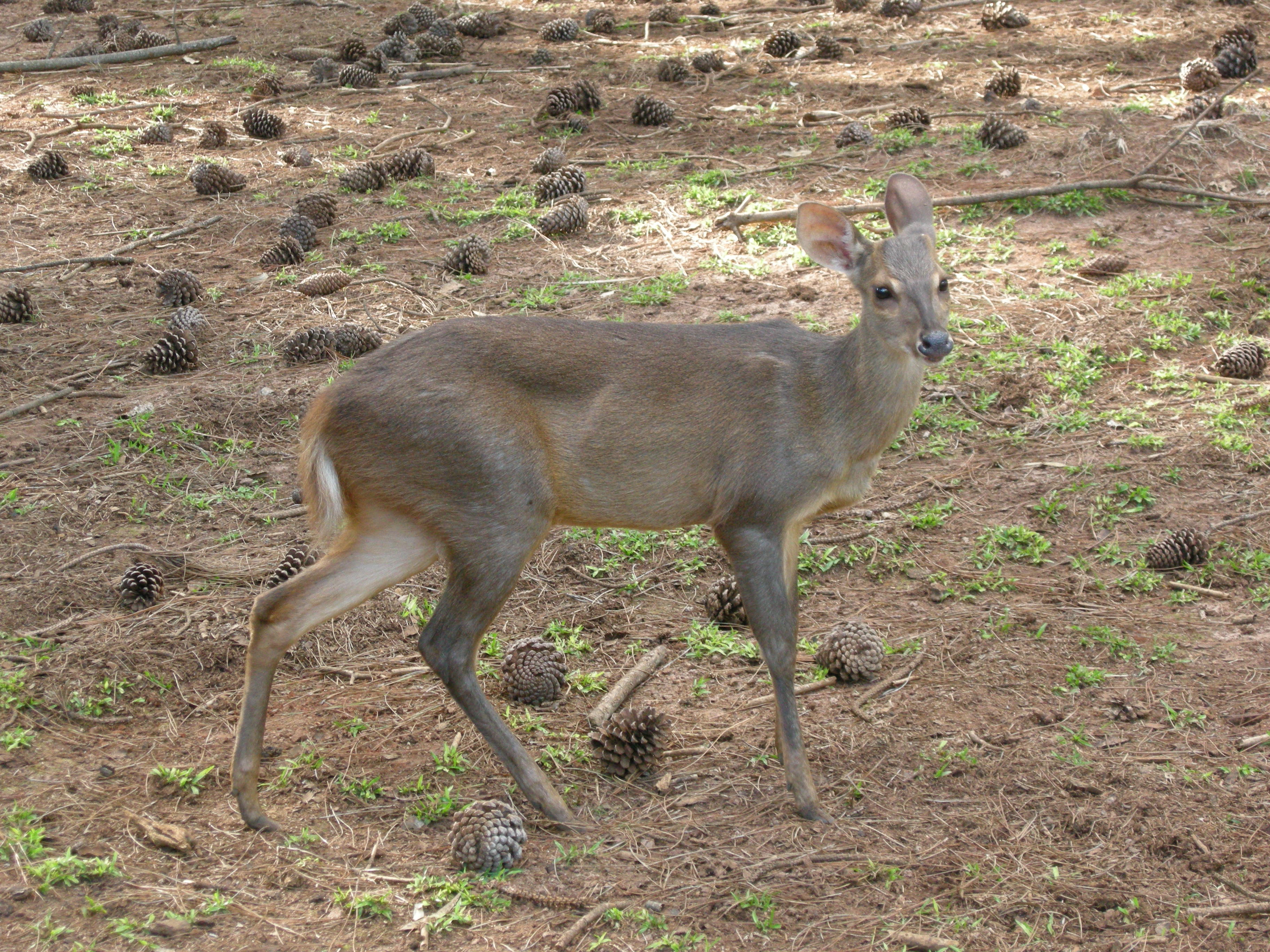 Daguet gris (Mazama gouazoubira) adulte photographié au Parc Ecologique "El Puma" (province de Missiones, Argentine).